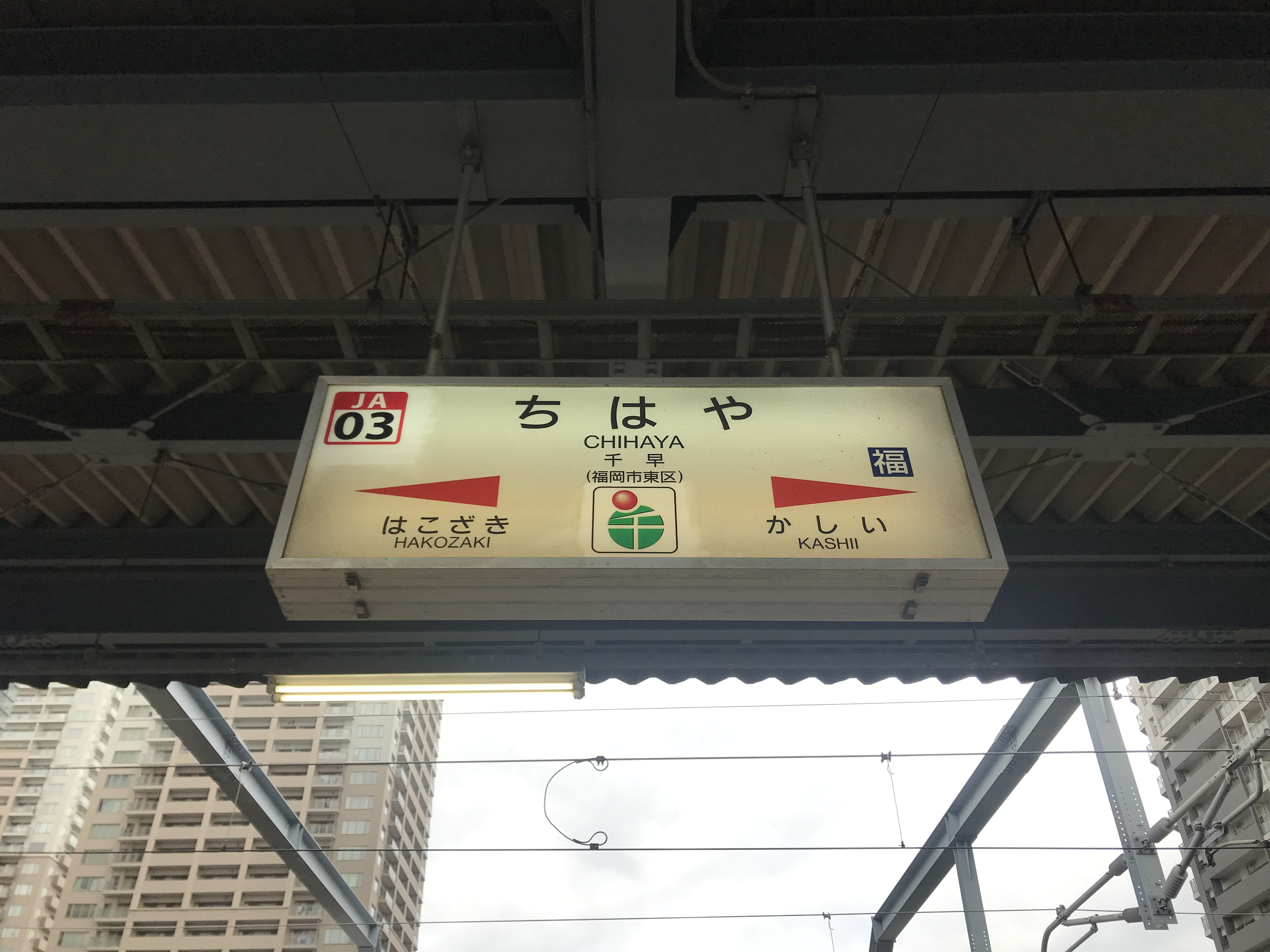 千早駅の駅名標。イラストは漢字の「千」に由来するロゴ